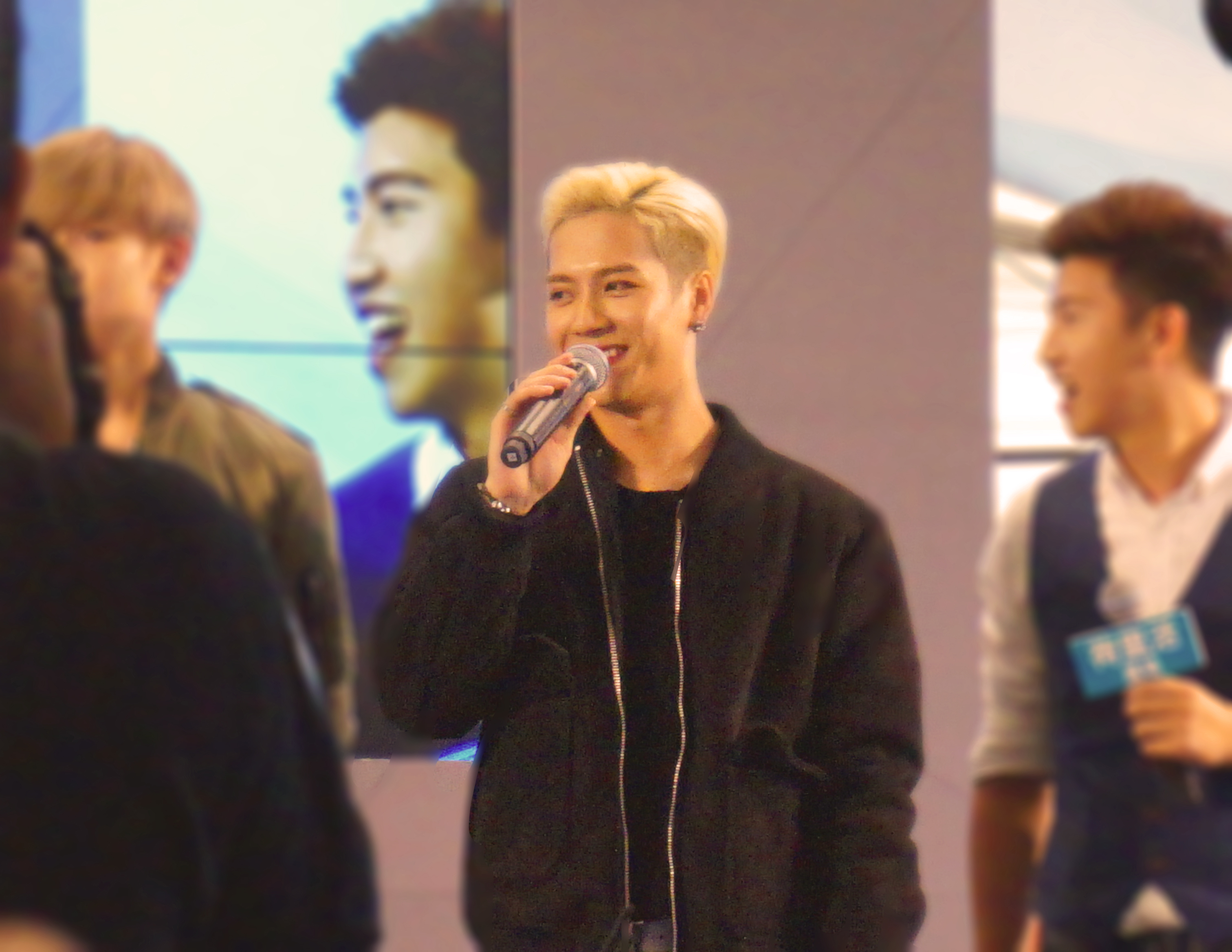 Got7 Jackson @ Hong Kong